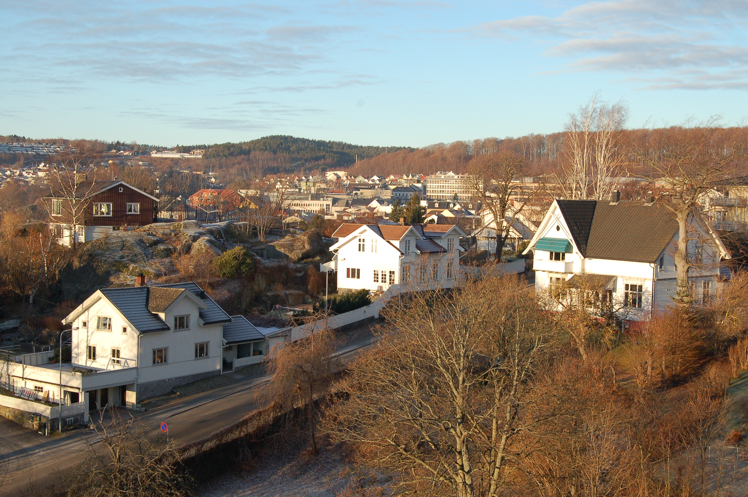 Den gamle politimesterboligen øverst til høyre i Herregårdsbakken i Larvik.